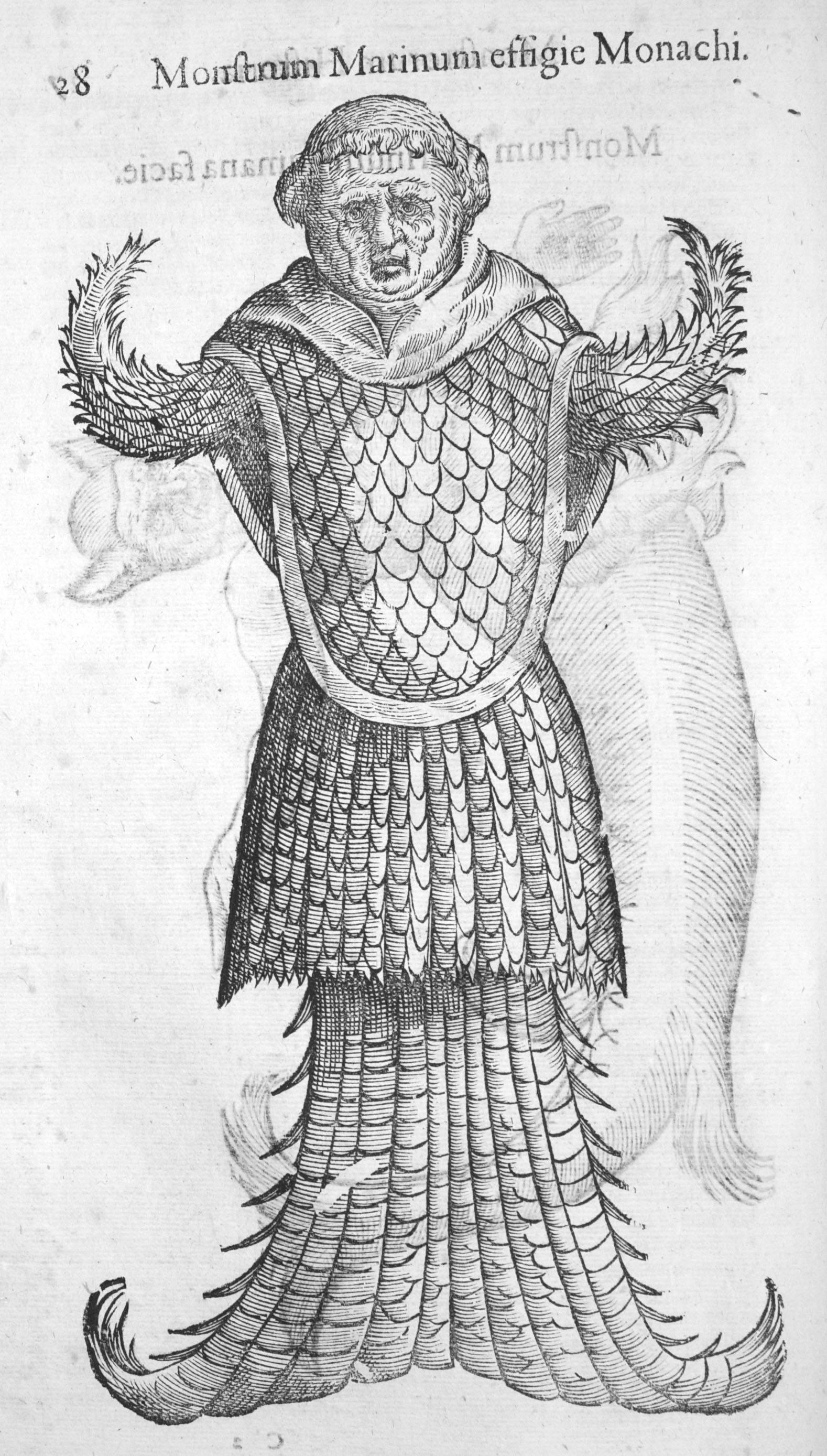 Monstre marin. Monstrorum historia d'Ulisse Androvandi, p. 28